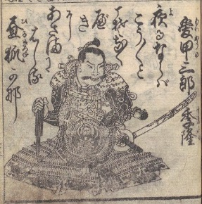 愛甲季隆